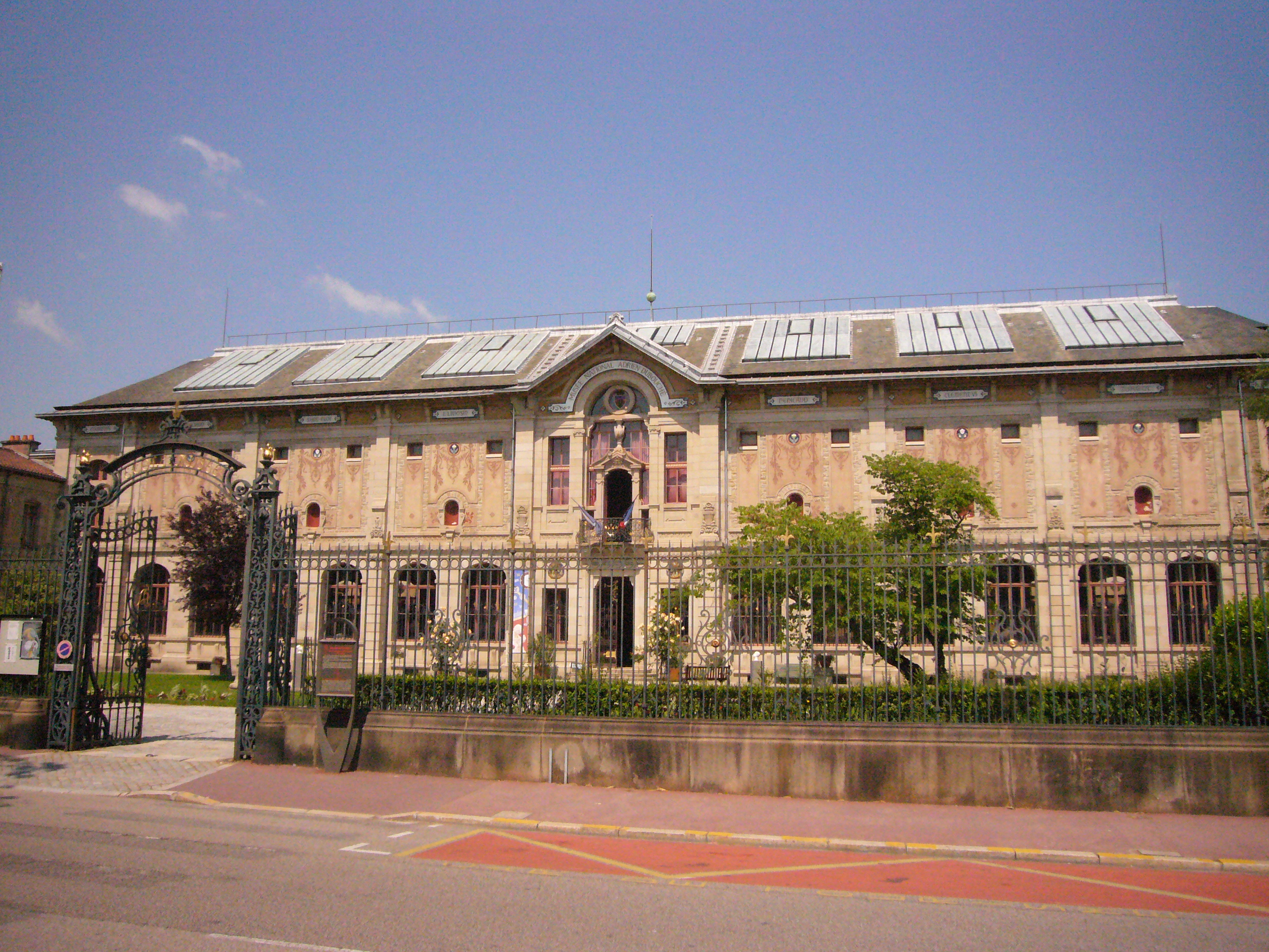 Musée de la Porcelaine Adrien Dubouché (Limoges, France)